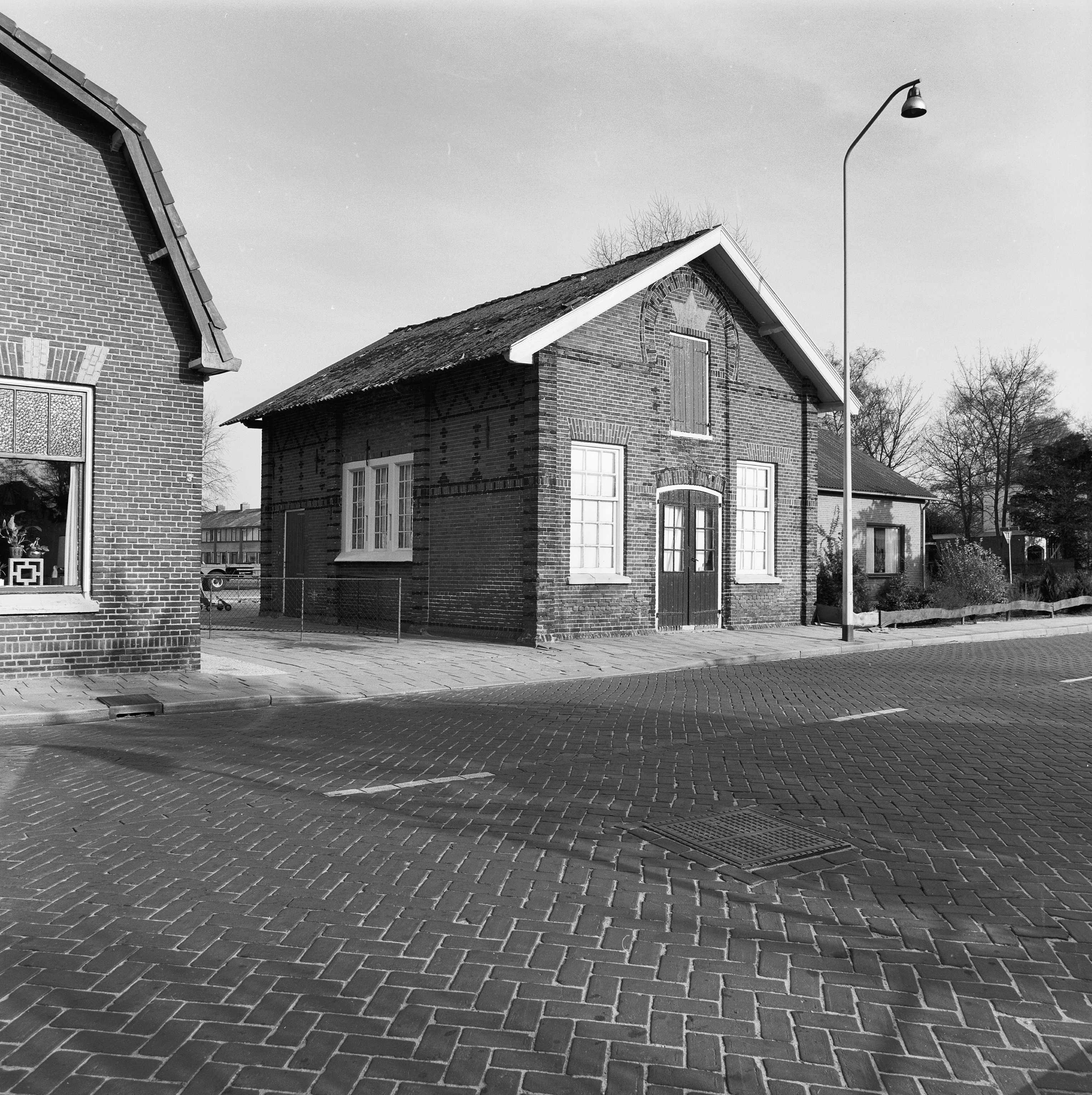 Synagoge: voor- en linker zijgevel